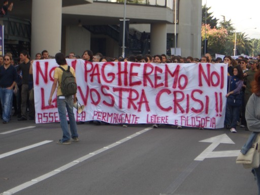 Striscione di studenti in protesta: "Non pagheremo noi la vostra crisi"